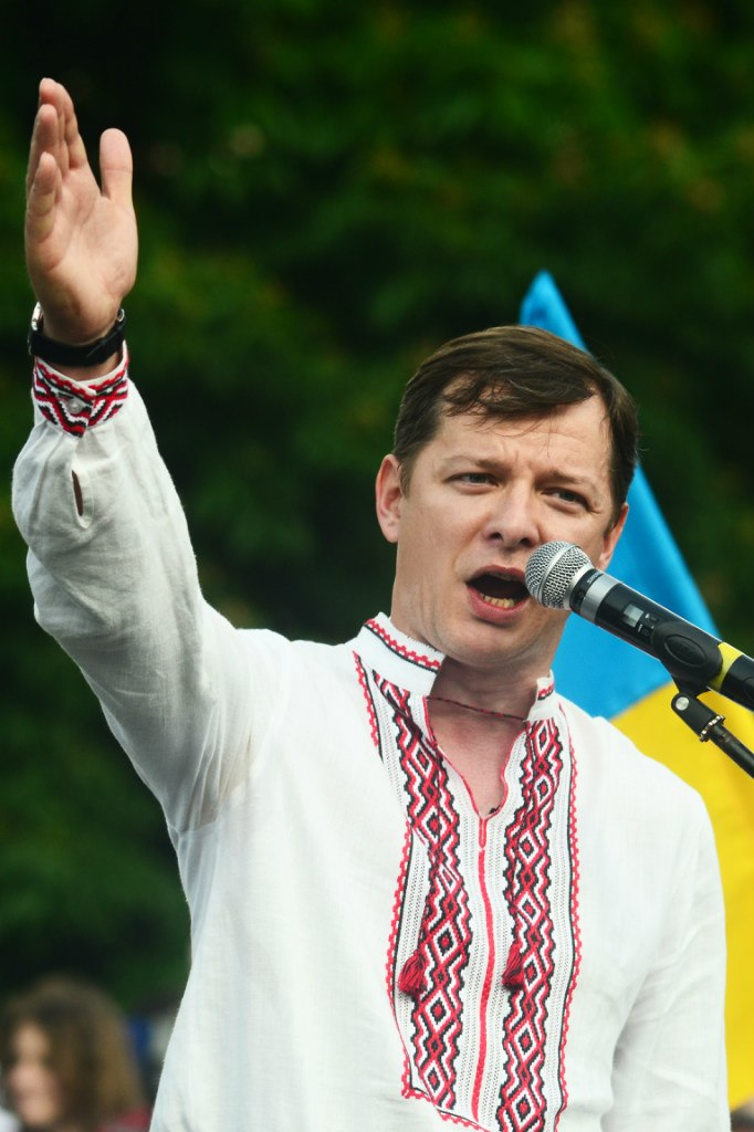 Встреча с народным депутатом Украины Олегом Ляшко во Львове, 23 мая